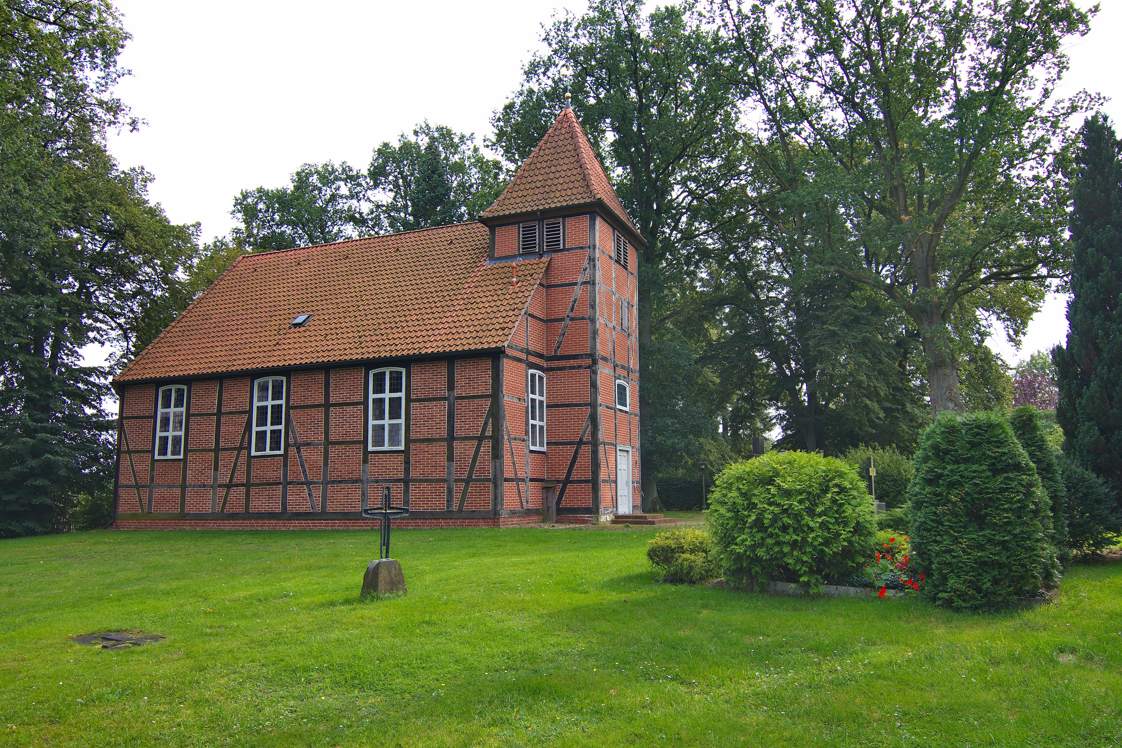 Fachwerkkirche zu Ribrau (Zernien), Niedersachsen, Deutschland im Jahr 2011